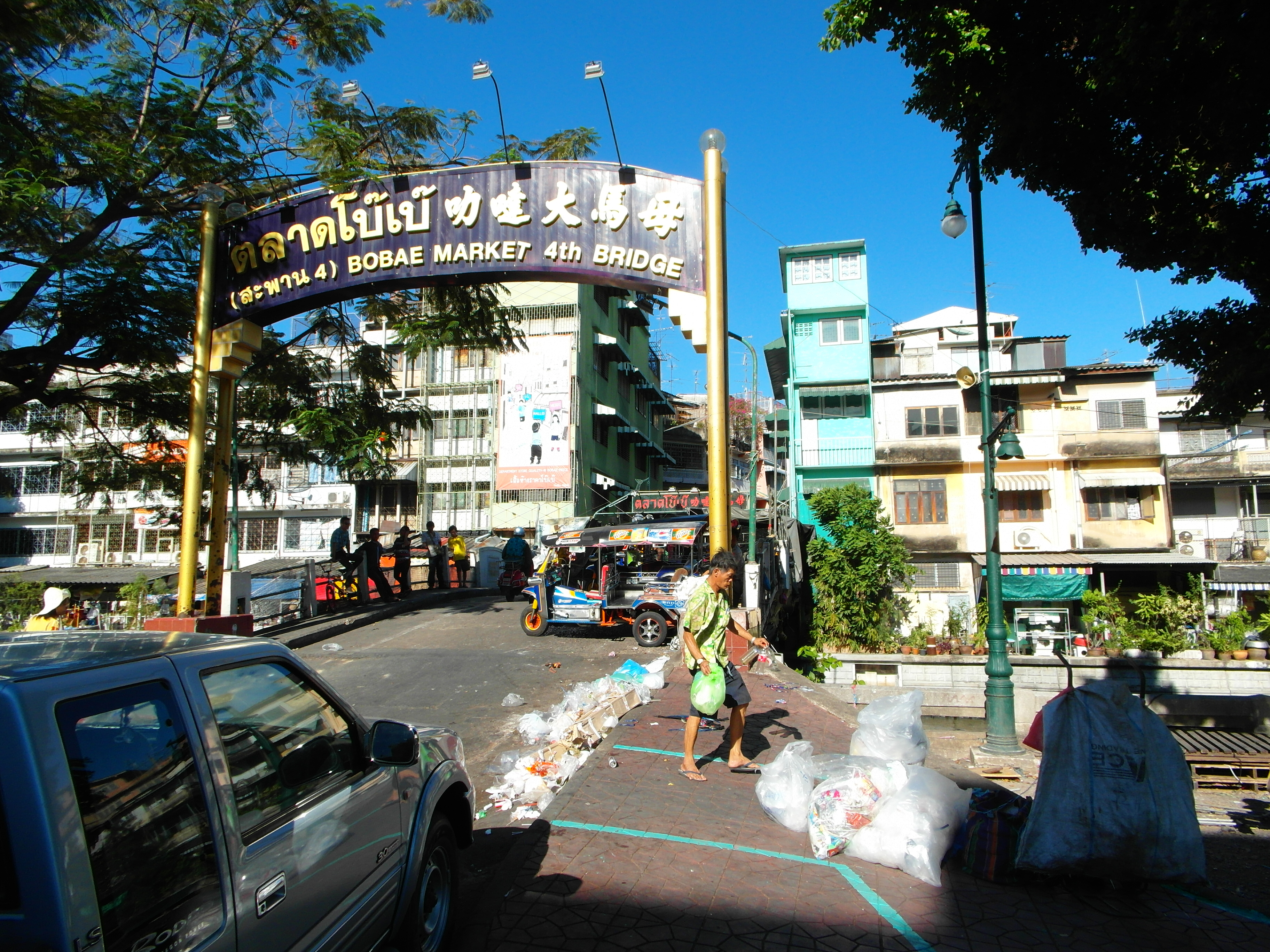 Bangkok 2013 april